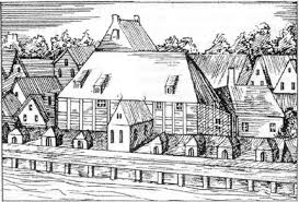 18th century engraving of the Hamburger Oper am Gänsemarkt (Hamburg Gänsemarkt opera house